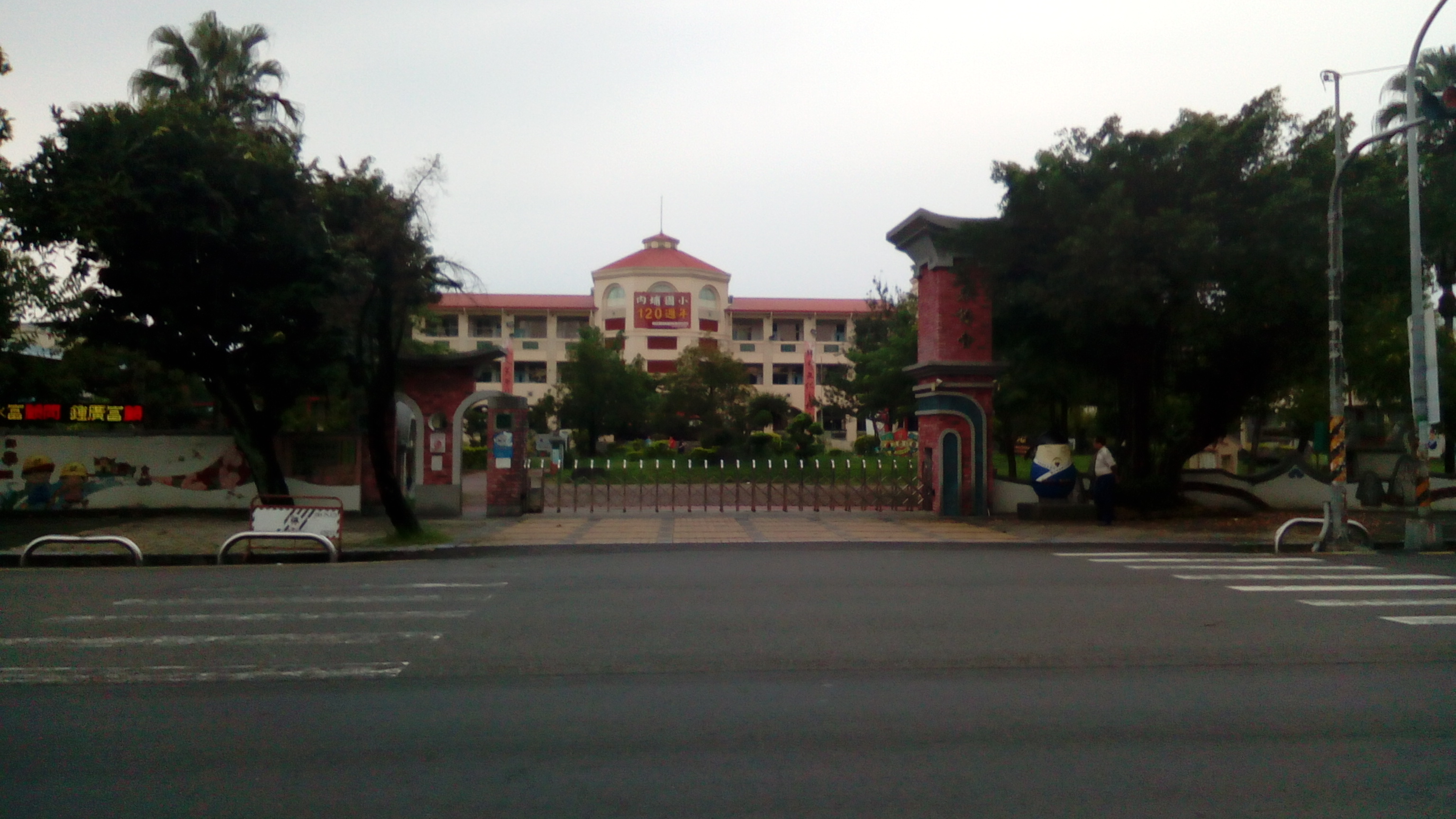 同上 遠方布幕為創校120周年紀念日